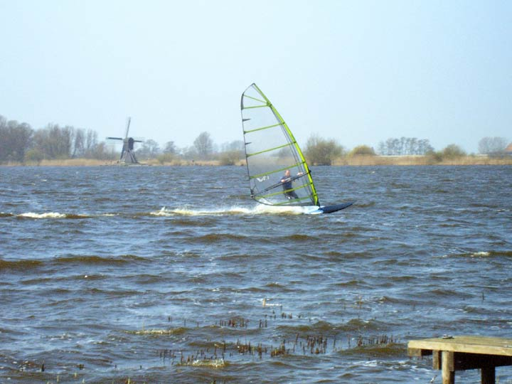 plankjesile op de Aldegeaster Brekken. Op de eftergrûn it Dorismooltsje.